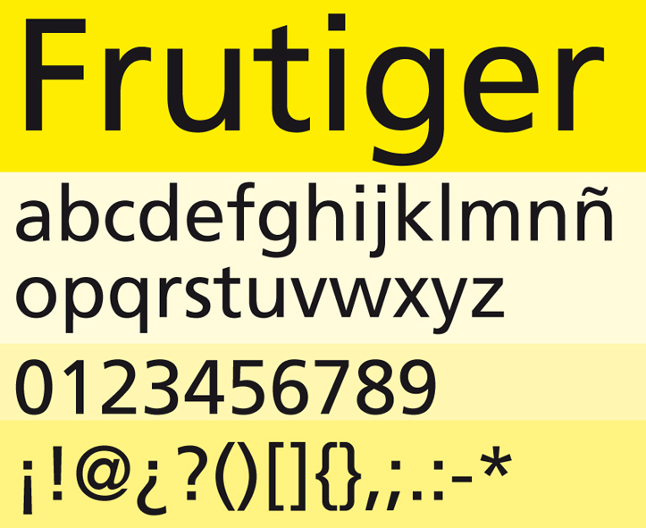 Mostra de tipografia Frutiger